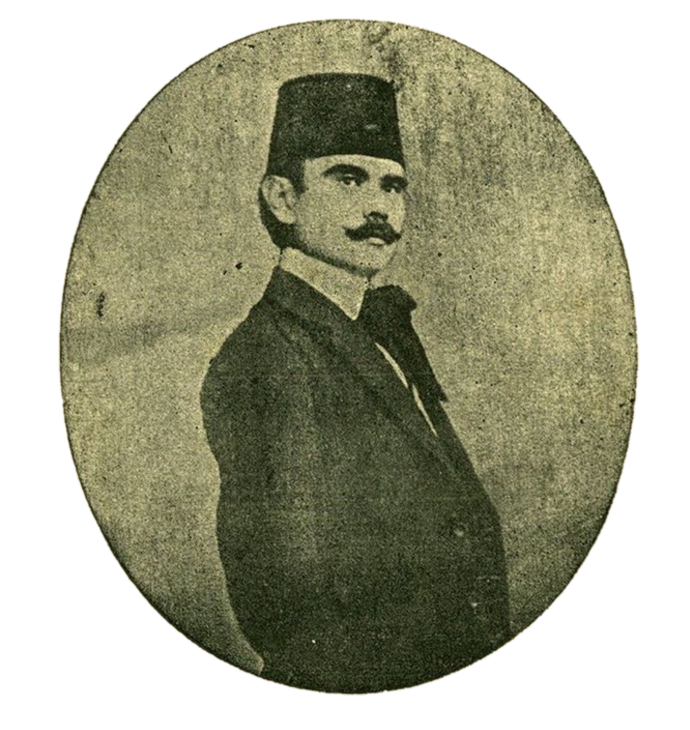 Номан Челебиджихан, крымскотатарский политик, писатель, поэт. Председатель правительства Крымской демократической республики. Без суда и следствия был убит 23 февраля 1917 года в Севастополе (Акъяр) красными матросами и выброшен в Чёрное море.